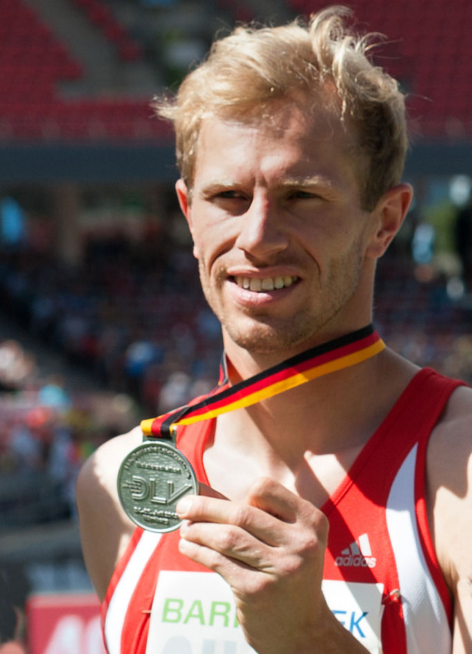 Deutsche Leichtathletik-Meisterschaften 2015: Männer Hochsprung - Eike Onnen